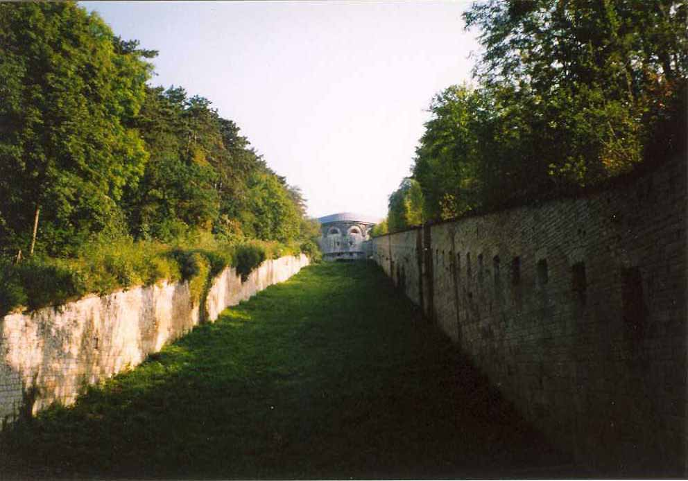 Wallanlagen der Bundesfestung Ulm